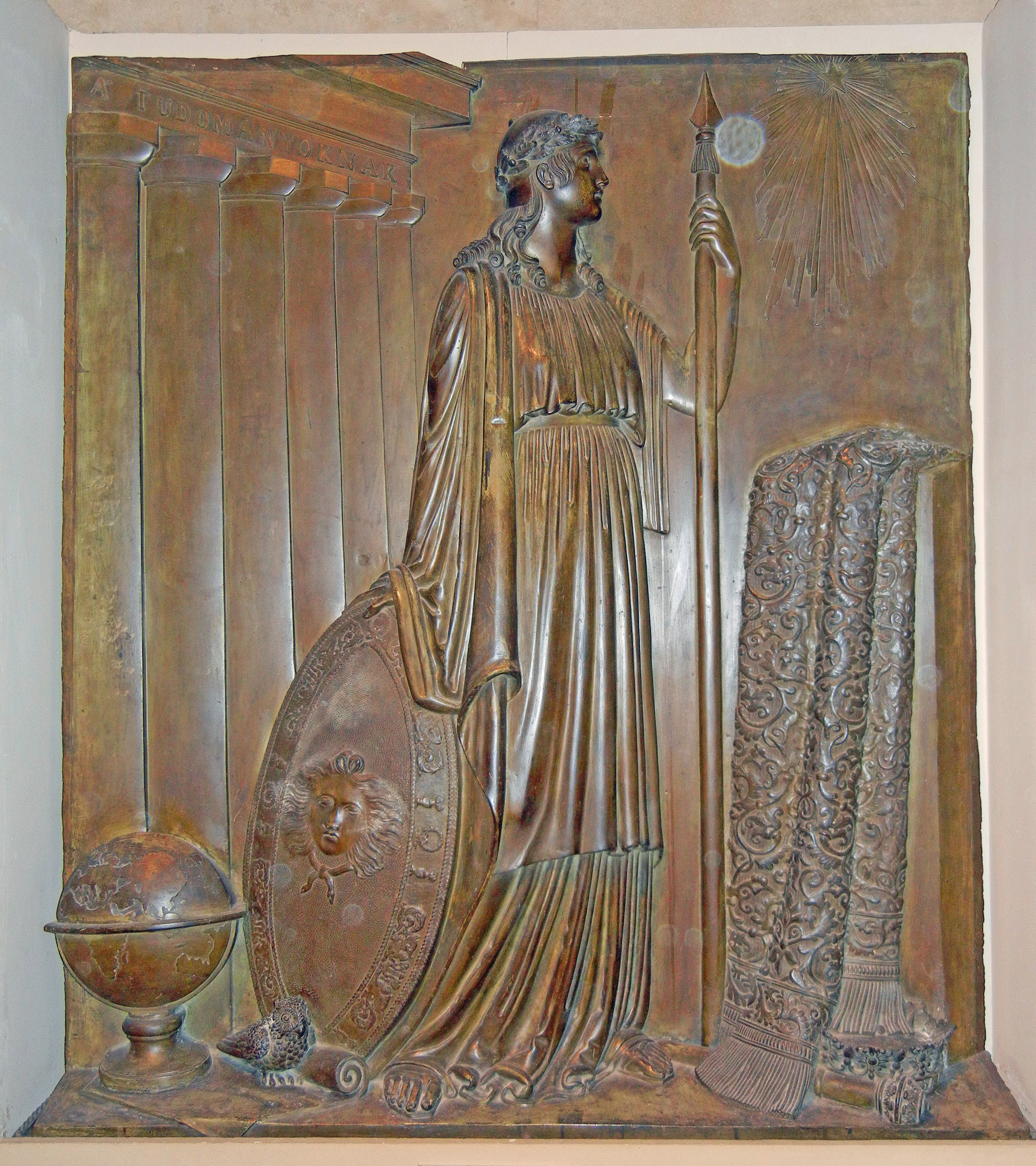 Budapest, château de Buda, Galerie nationale hongroise (Magyar Nemzeti Galéria), István FERENCZY (1792-), L'allégorie de la science, 1842-1843. Détail du projet de mémorial du roi Matthias